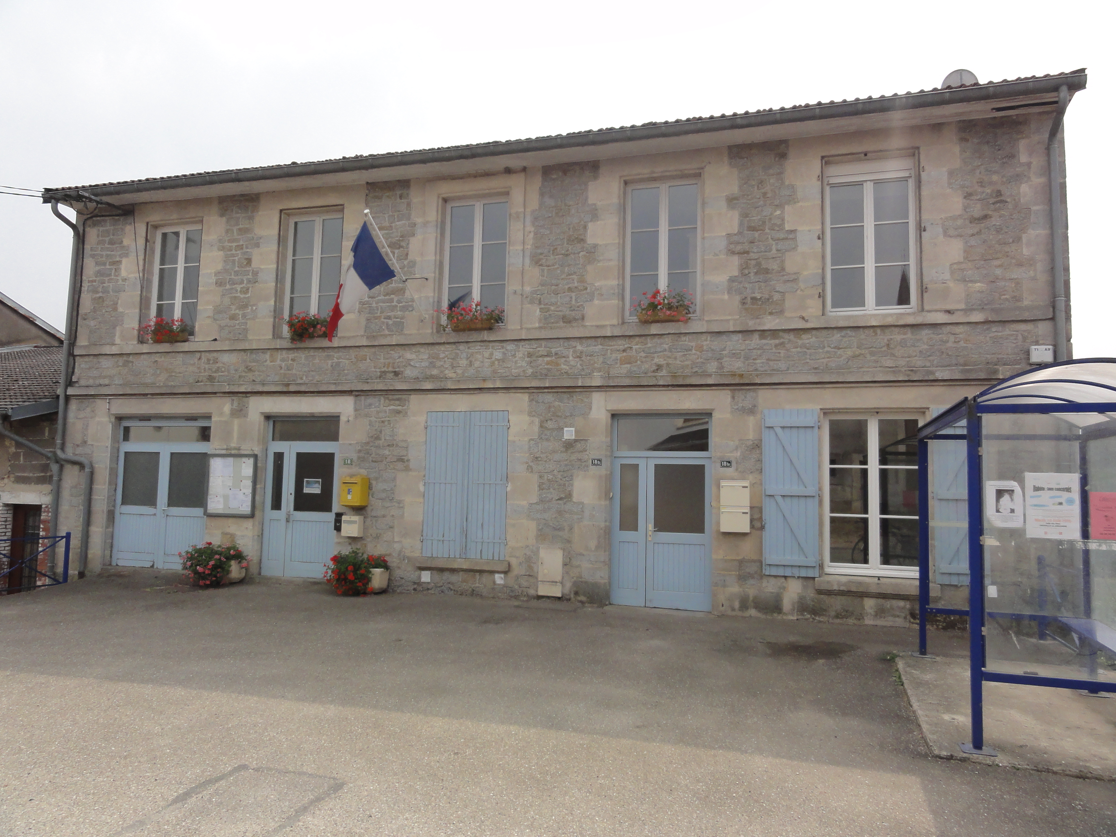 Brabant-en-Argonne (Meuse) mairie